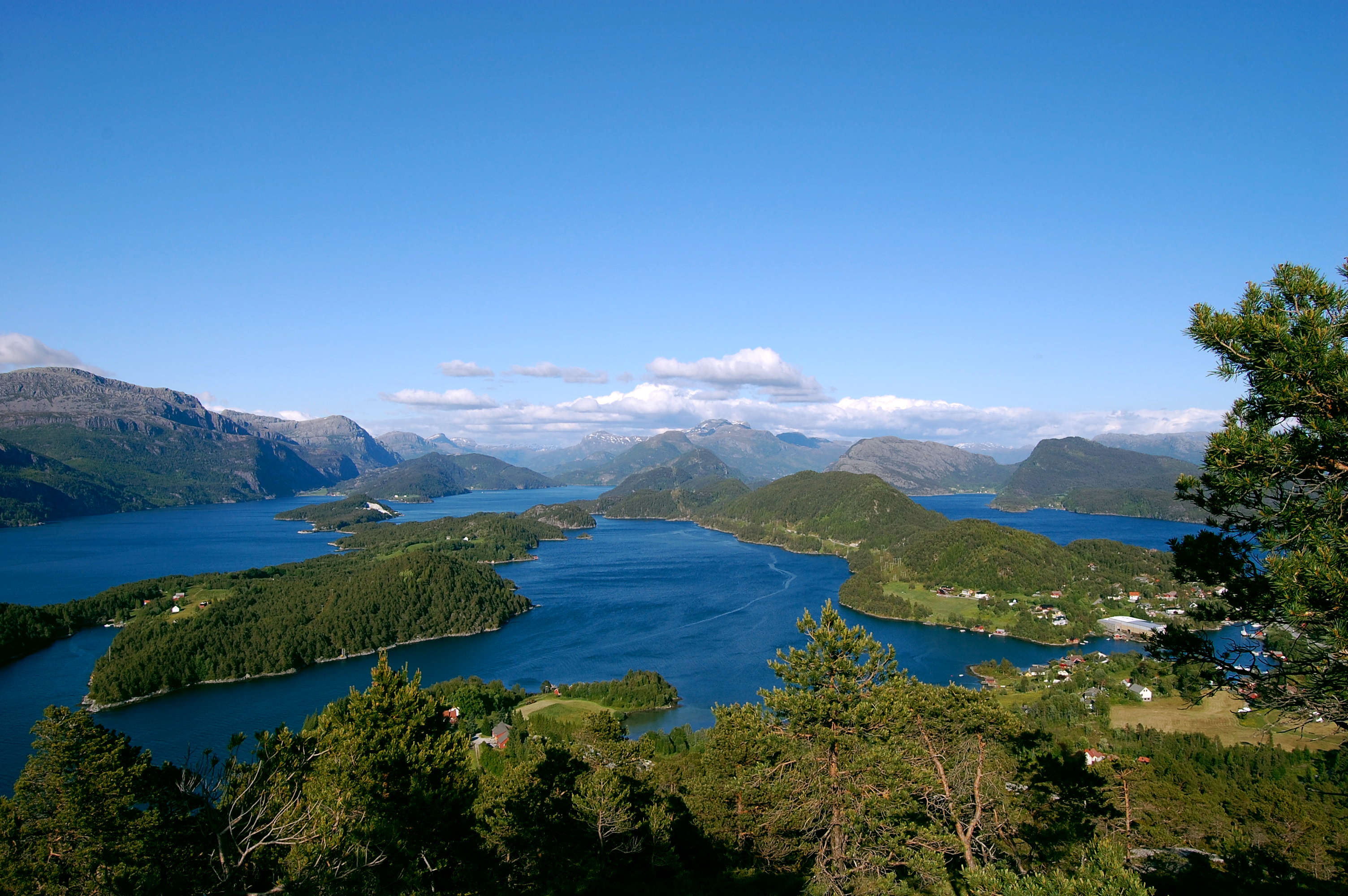 Utsikt frå aust på Brandsøya i Flora kommune. Klavfjorden i midten. Tettstaden Brandsøy til høgre